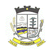 Brasão do Município de Xambioá.